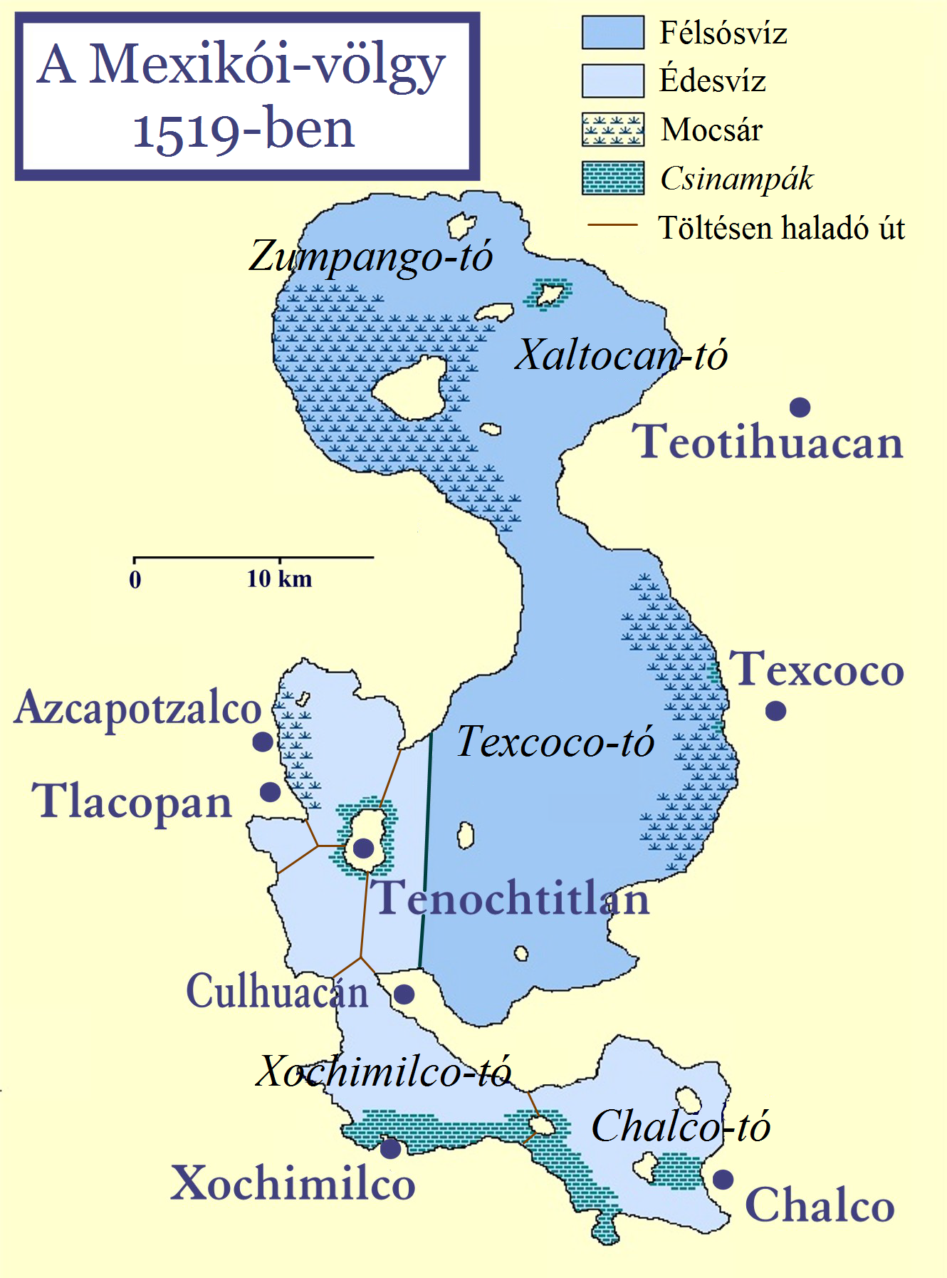 A Mexikói-völgy 1519-ben